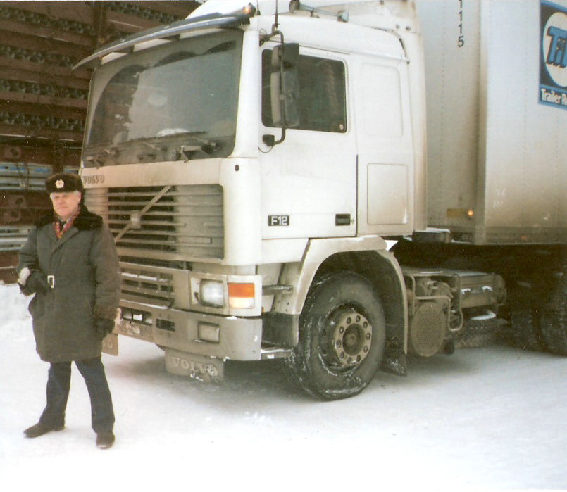 Volvo F 12, Bj. 92